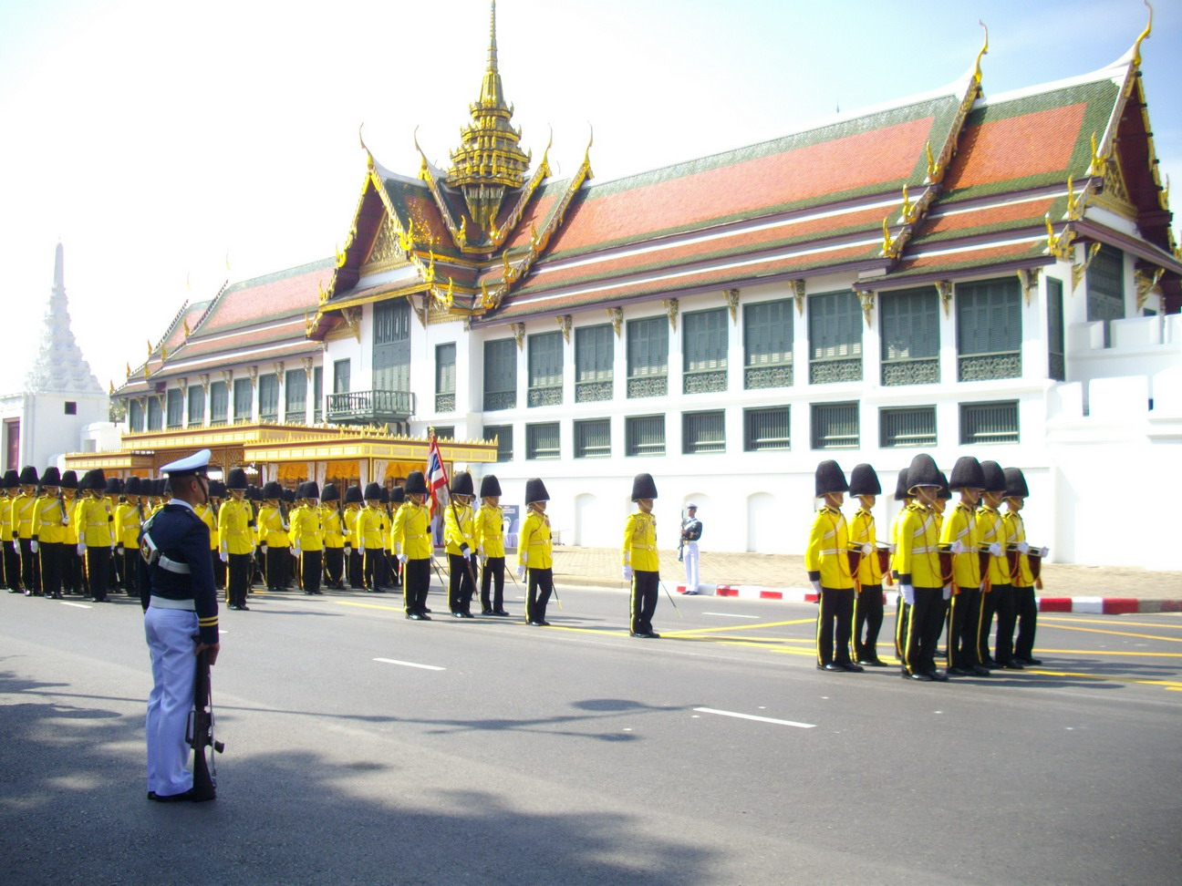 แถวทหารรักษาพระองค์จากกองพันทหารราบที่ 1 กรมทหารราบที่ 1 รักษาพระองค์ กองพลนาวิกโยธิน ในริ้วกระบวนเชิญพระศพสมเด็จพระเจ้าพี่นางเธอ เจ้าฟ้ากัลยานิวัฒนา กรมหลวงนราธิวาสราชนครินทร์ ริ้วกระบวนที่ 2 หน้าพระที่นั่งสุทไธสวรรยปราสาท ถนนสนามไชย วันที่ 15 พฤศจิกายน พ.ศ. 2551